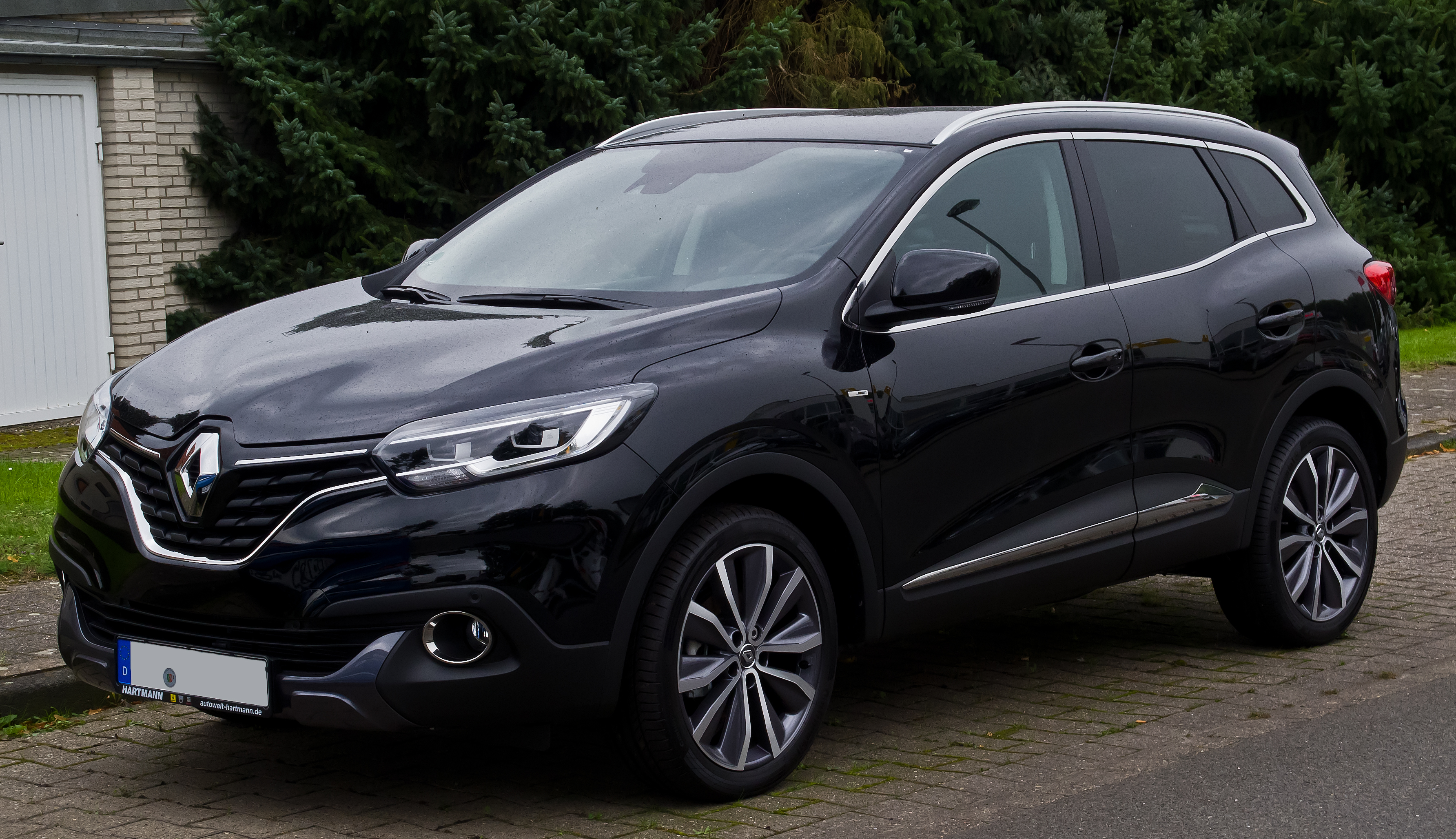 Renault Kadjar Bose Edition ENERGY dCi 130 4x4